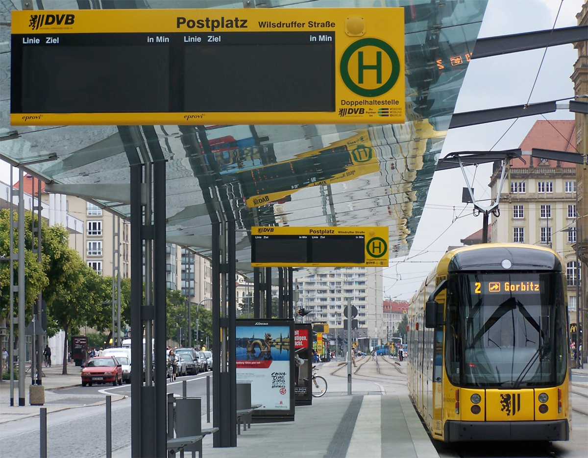 Dynamischer Fahrgastinformations (DFI) Anzeiger am Dresdner Postplatz mit Einfahrt eines Stadtbahnwagens (NGT D12 DD) der Linie 2 in Richtung Gorbitz.